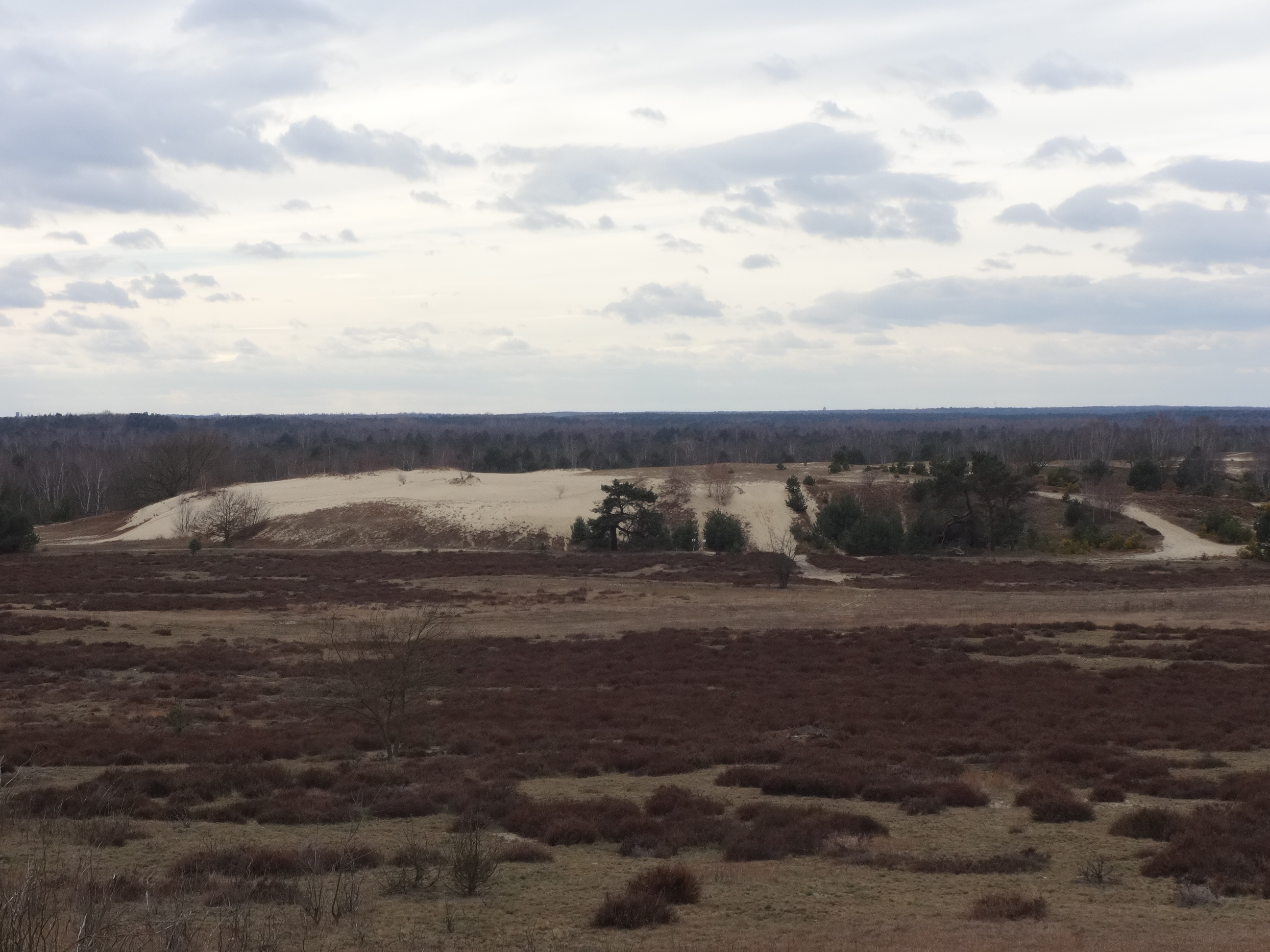 Das NSG Forst Zinna Jüterbog-Keilberg befindet sich auf einem ehemaligen Truppenübungsplatz. Das 7200 Hektar große Gebiet ist die größte zusammenhängende Fläche, die von der Stiftung betreut wird. Ein Wandernetz führt unter anderem zu einer Wanderdüne. Entlang des Wegenetzes zum Wurzelberg soll ein Wildnis-Gedanken-Gang mit Zitaten von Schriftstellen und Philosophen zum Nachdenken anregen.